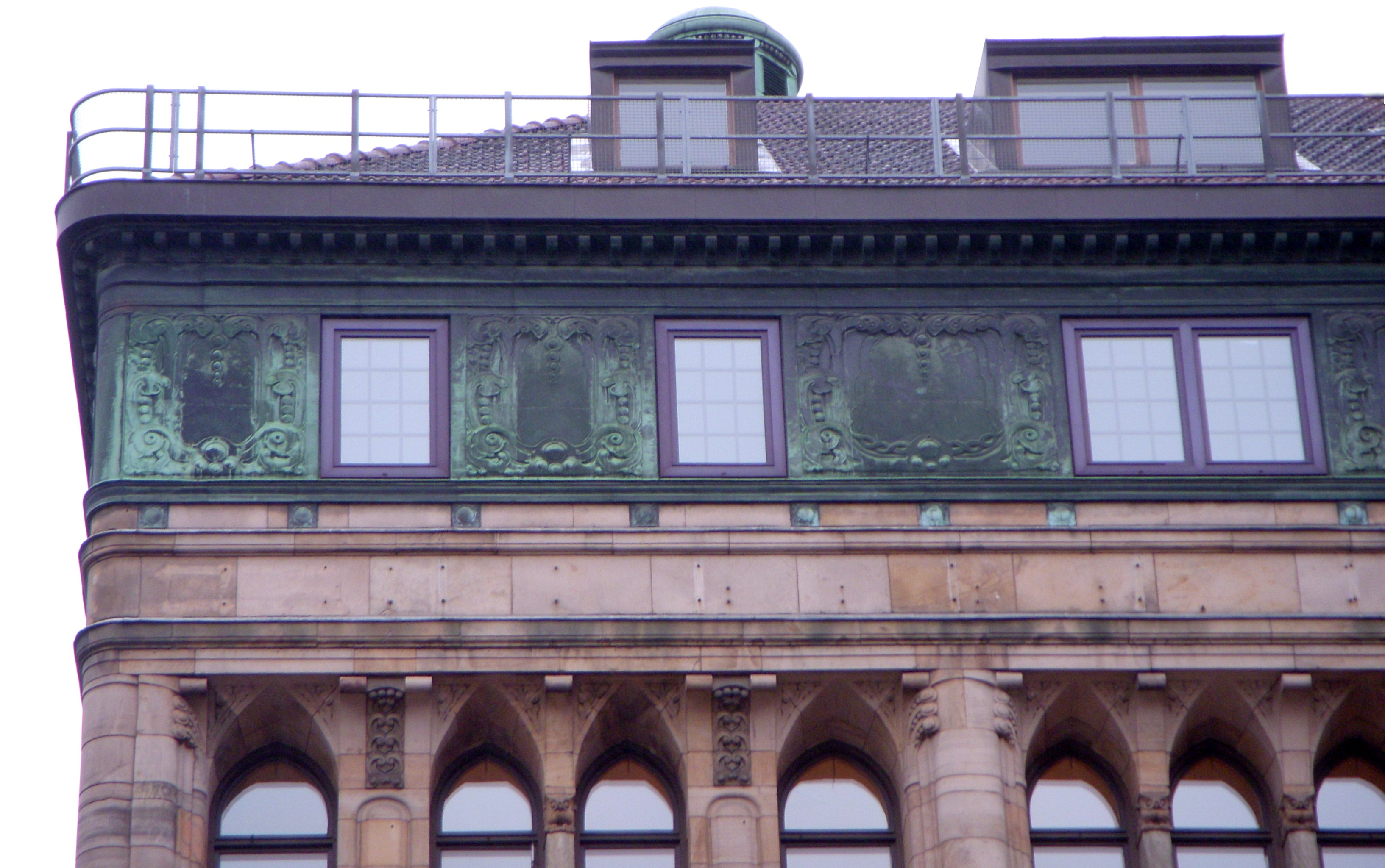 Myrstedt & Stern, Kungsgatan, Stockholm